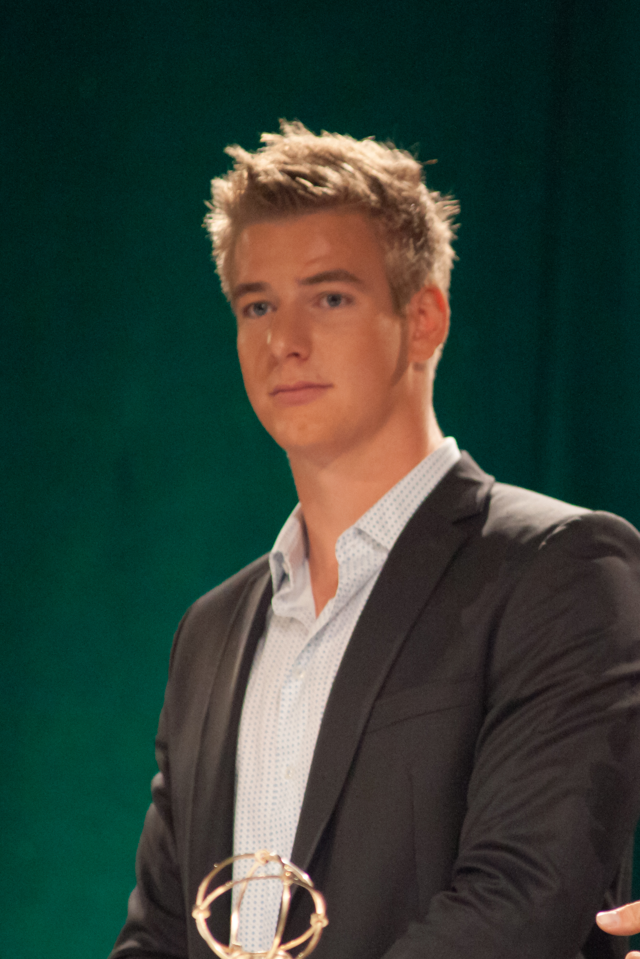 Mérite sportif vaudois 2014 - Barnabe Delarze